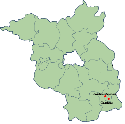 Witajeinrichtungen in Brandenburg